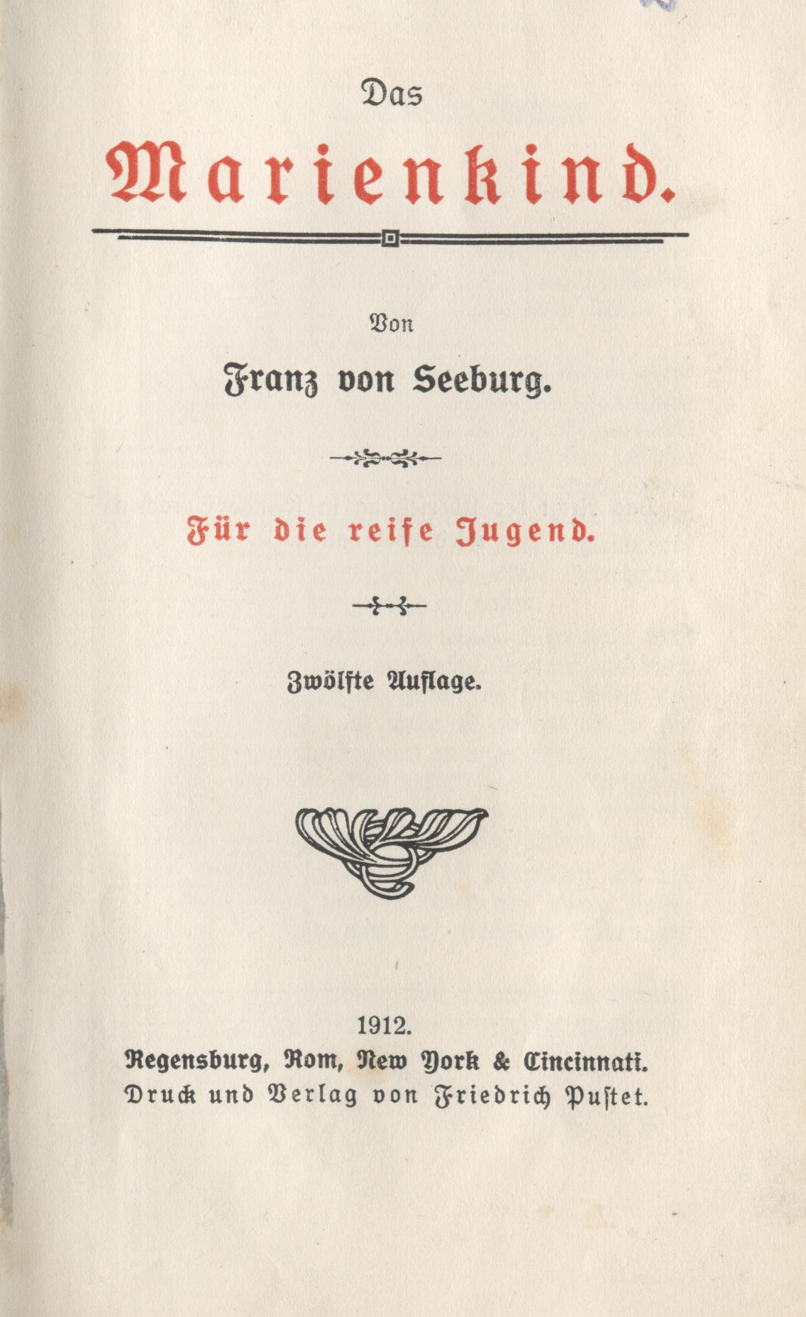 Franz von Seeburg, Pristerschriftsteller München, Das Marienkind